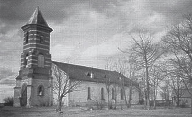 Кирха в деревне Молосковицы после ремонта 1902 года